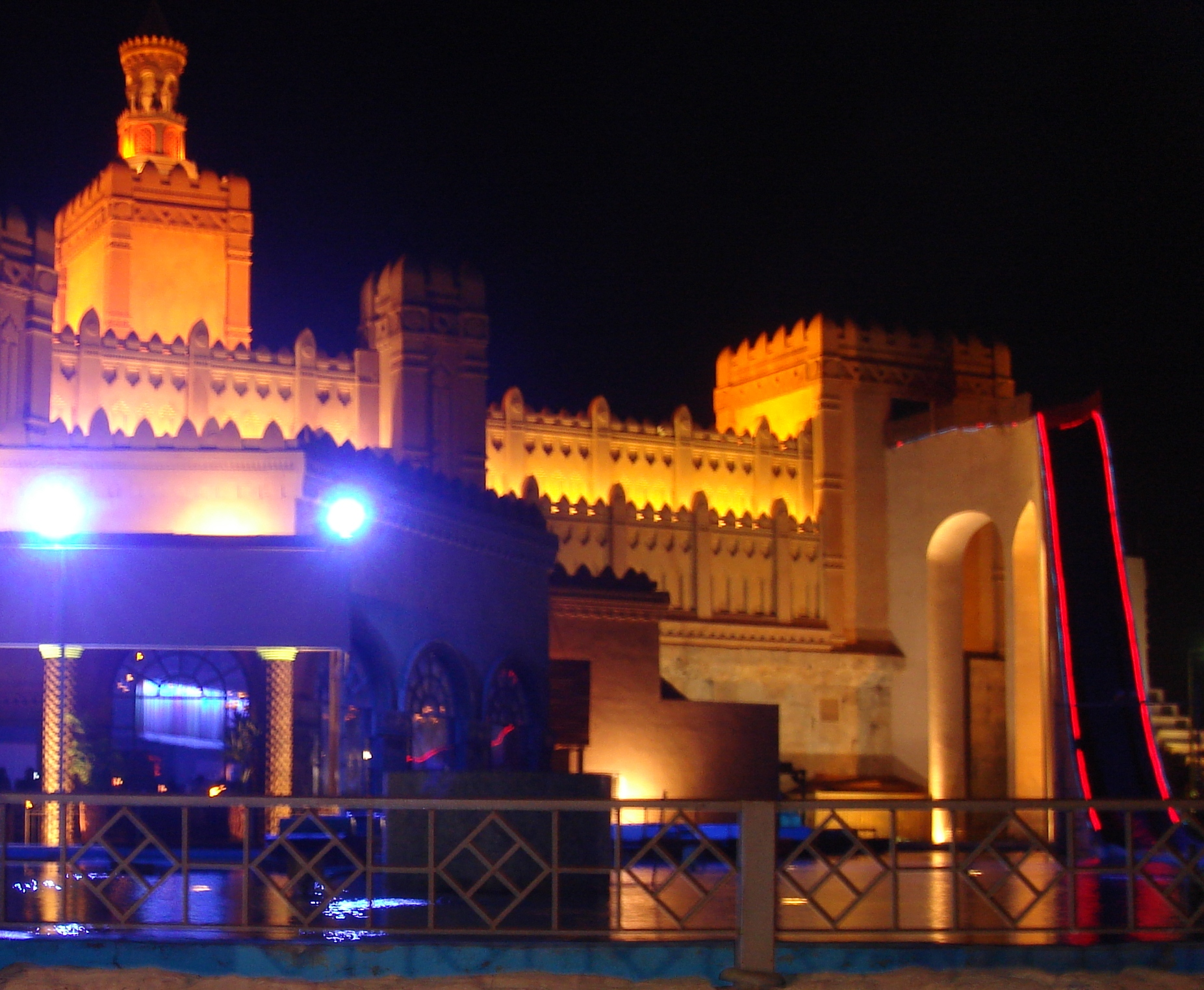 "עיר המלכים" באילת בלילה